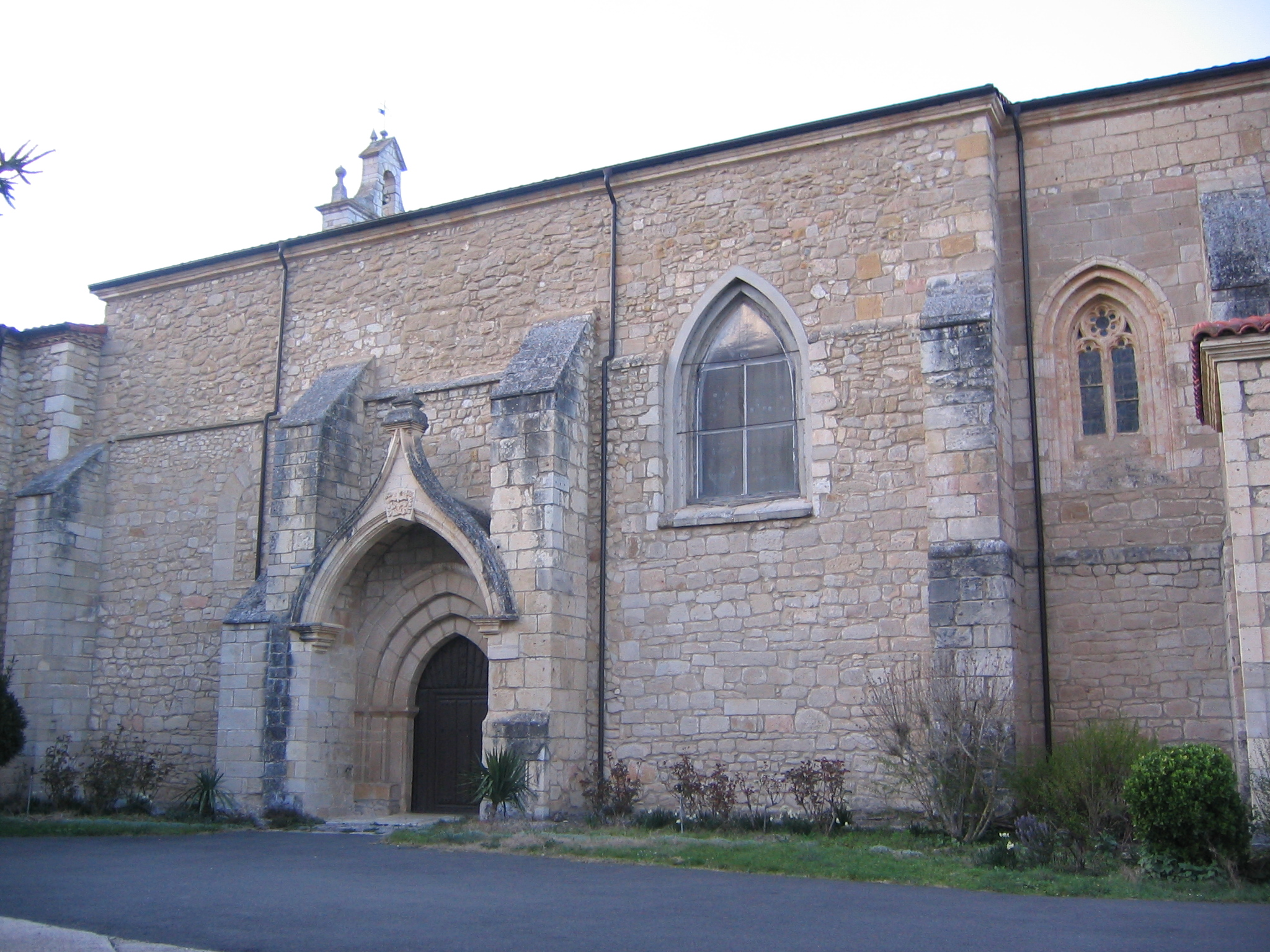 Convento de las clarisas en Nofuentes, Burgos (España).